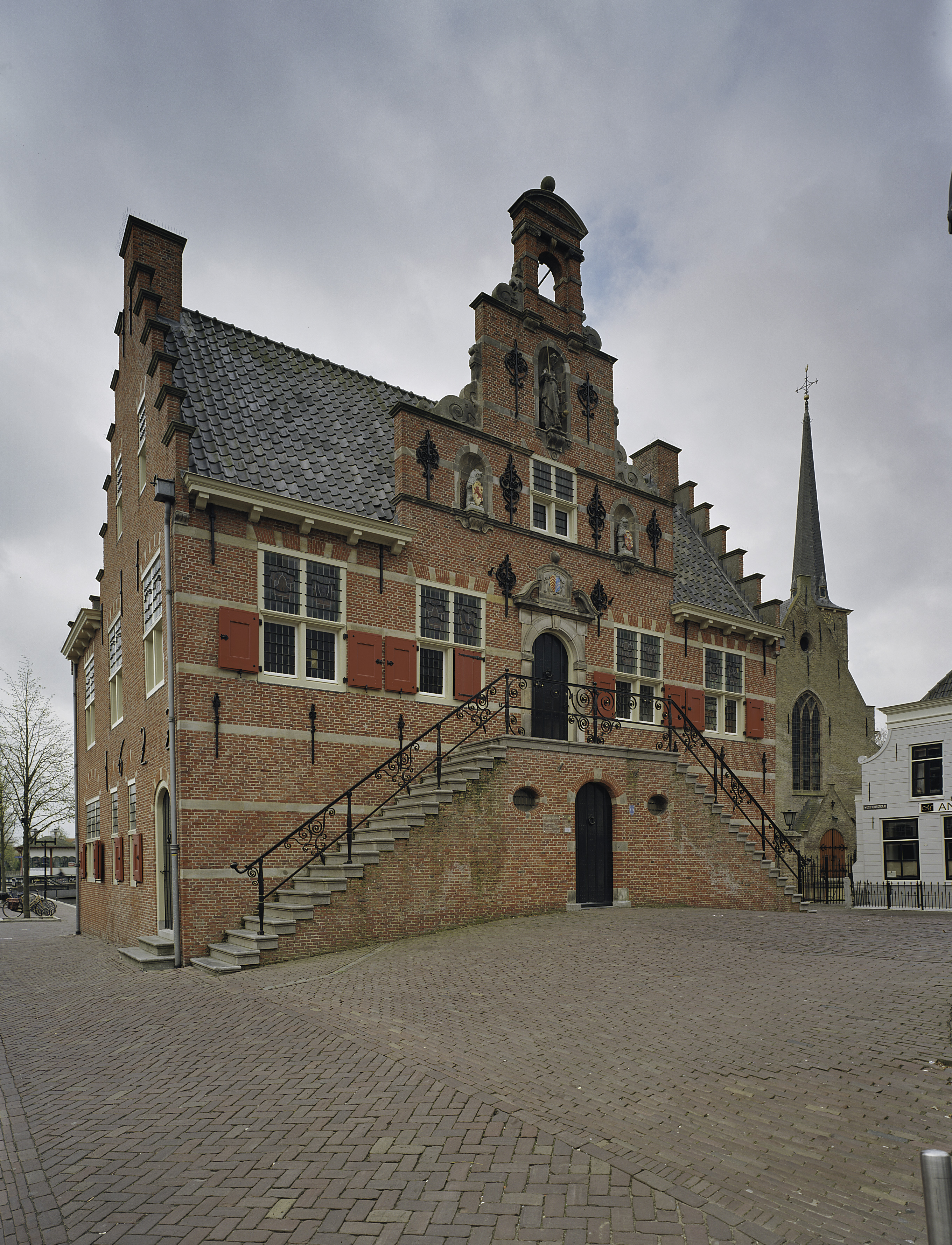 Raadhuis: Overzicht voorgevel, bordes met dubbele trap (opmerking: Gefotografeerd voor Monumenten In Nederland Zuid-Holland)